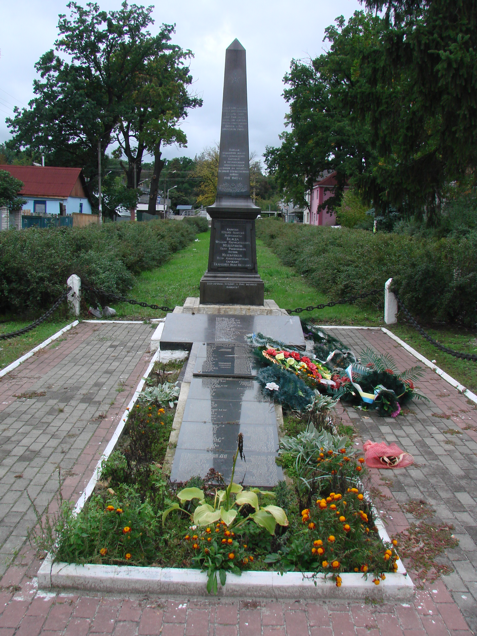 Пам’ятник воїнам-визволителям та односельчанам і партизанці Дідіківсь- кій Л.Ф., Смт.Борова, центр селища